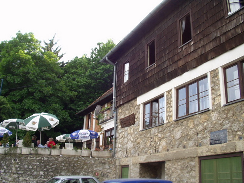 Kalnik - Mountain's house